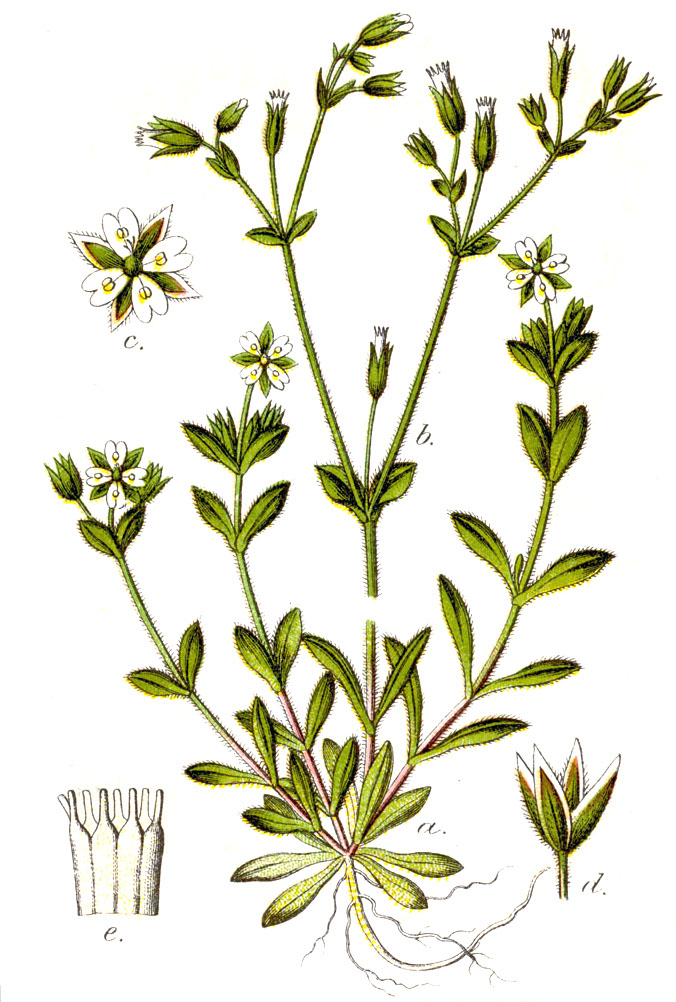 Cerastium diffusum Pers., syn. Alsine tetrandra E.H.L.Krause Original Caption Esmarch-Miere, Alsine tetrandra